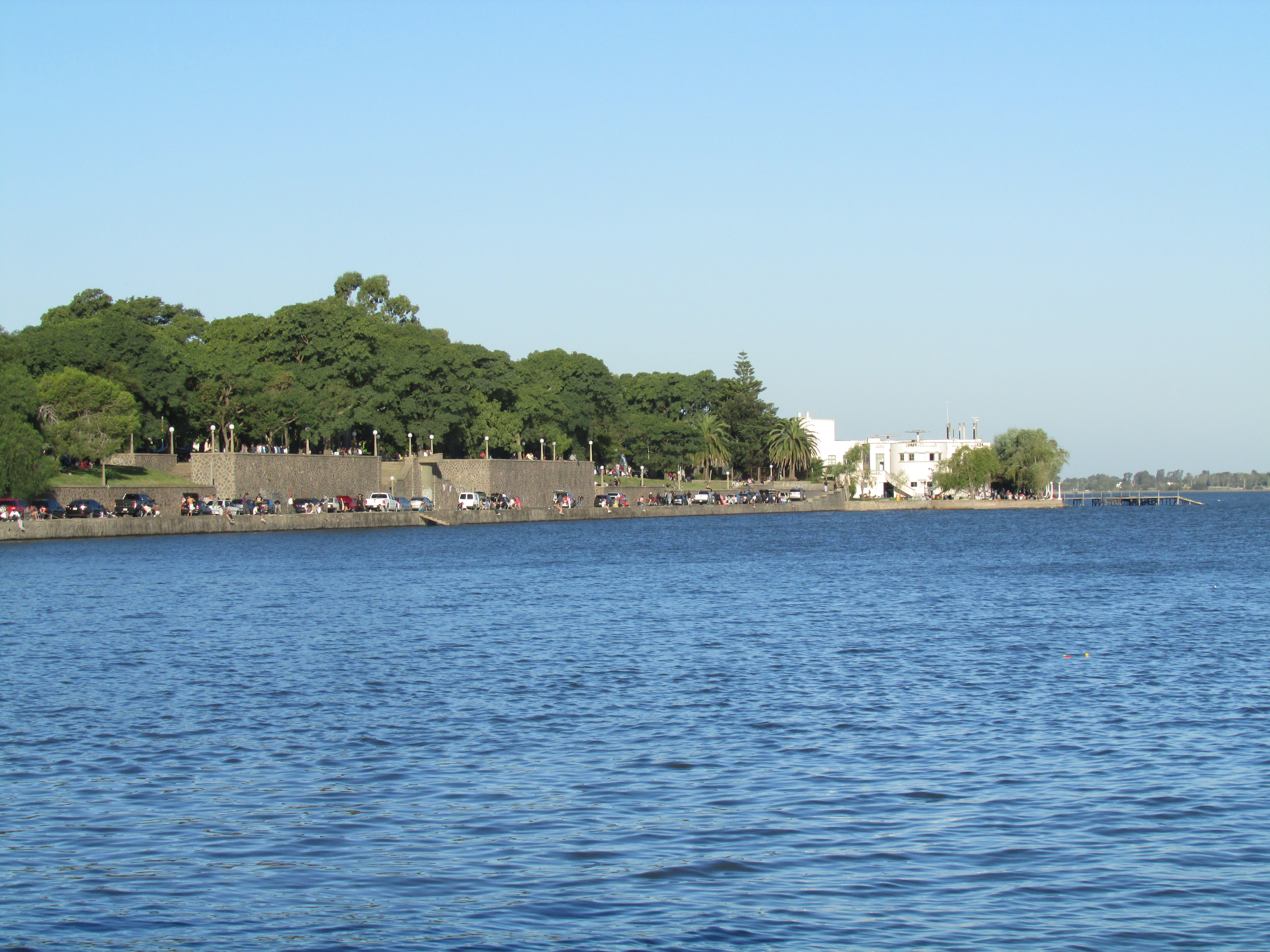 Costanera de la laguna Chascomús en la ciudad homónima, provincia de Buenos Aires, Argentina.